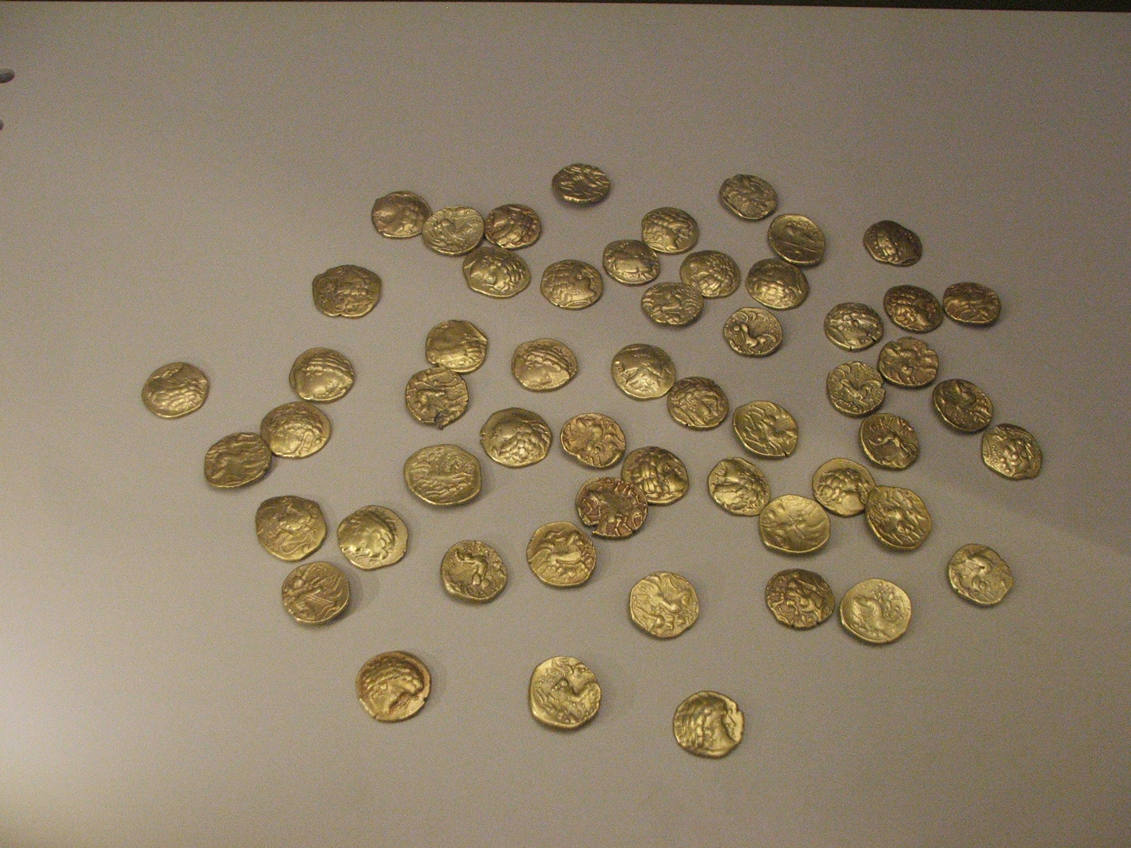 Le trésor des Sablons composé en sa totalité de 152 pièces d'or datant du IVè siècle AVJC. Il fut retrouvé en 1997, sur les bords de l'Huisne, au sud-est du Mans.